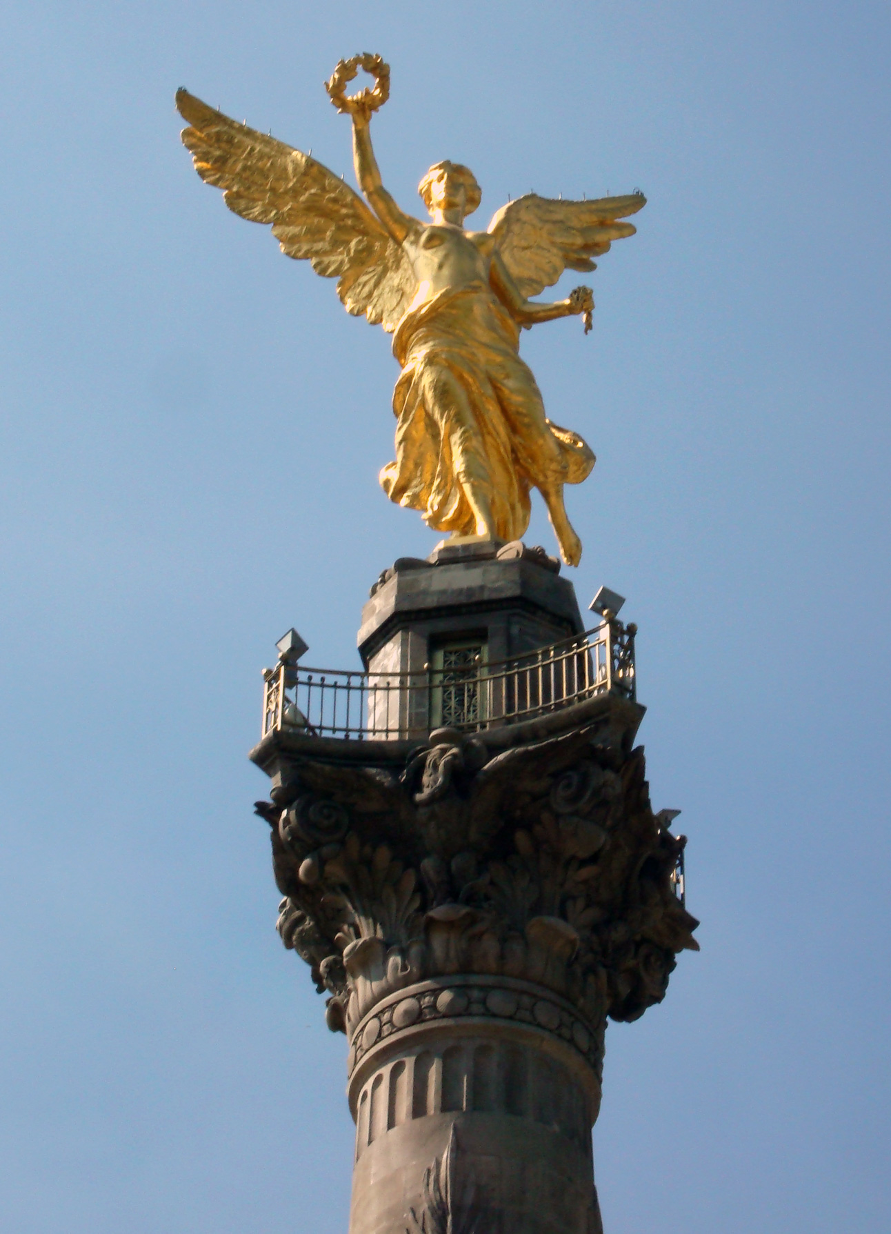 Angel de la Independencia, Mexico - Un Angel se posa sobre columna Corintia en el Paseo de la Reforma.